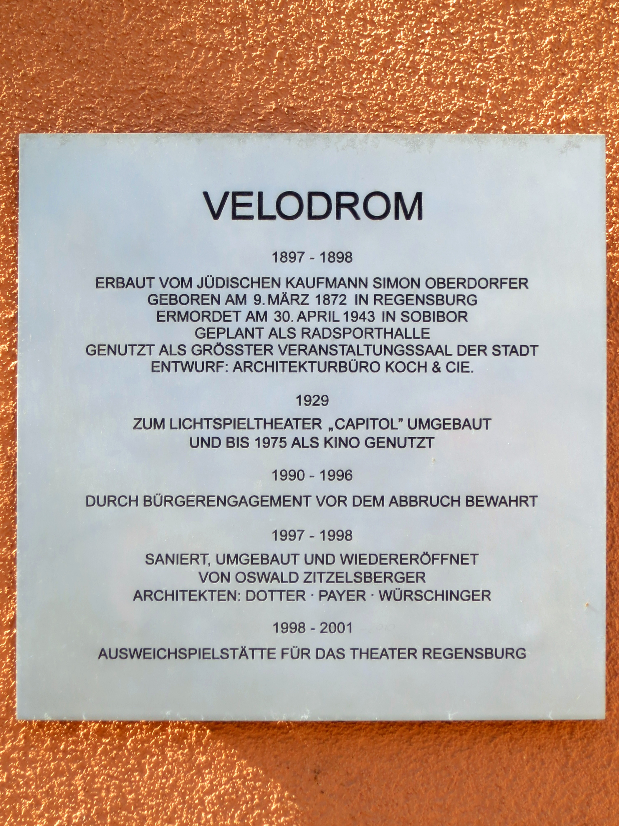 Tafel am Gebäude des Velodroms in Regensburg